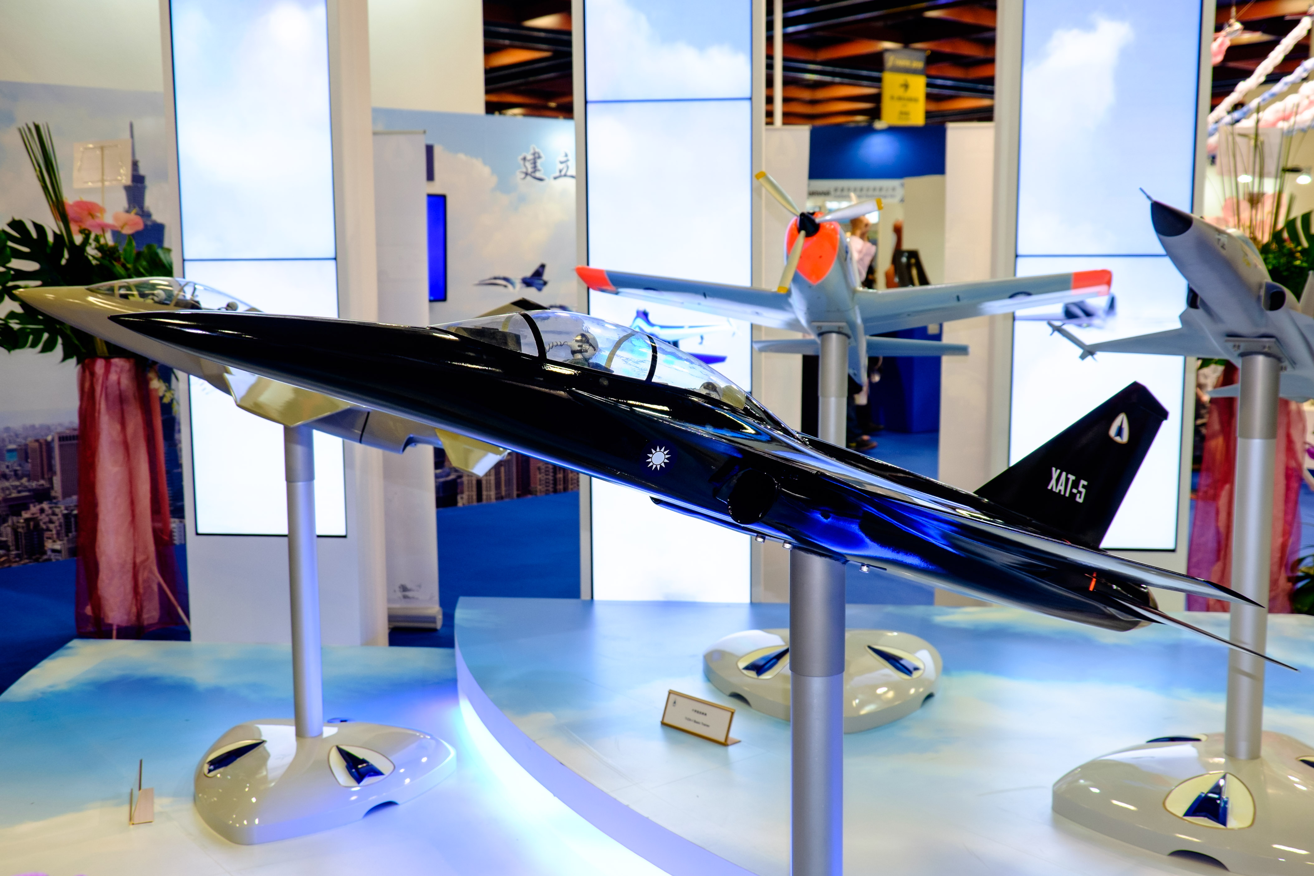 中文（台灣）: 2015台北國際航太暨國防工業展覽會，漢翔航空工業攤位展示以F-CK-1經國號戰鬥機為基礎發展的高級教練機XAT-5模型，預定未來競標中華民國空軍次世代高級教練機的方案之一。